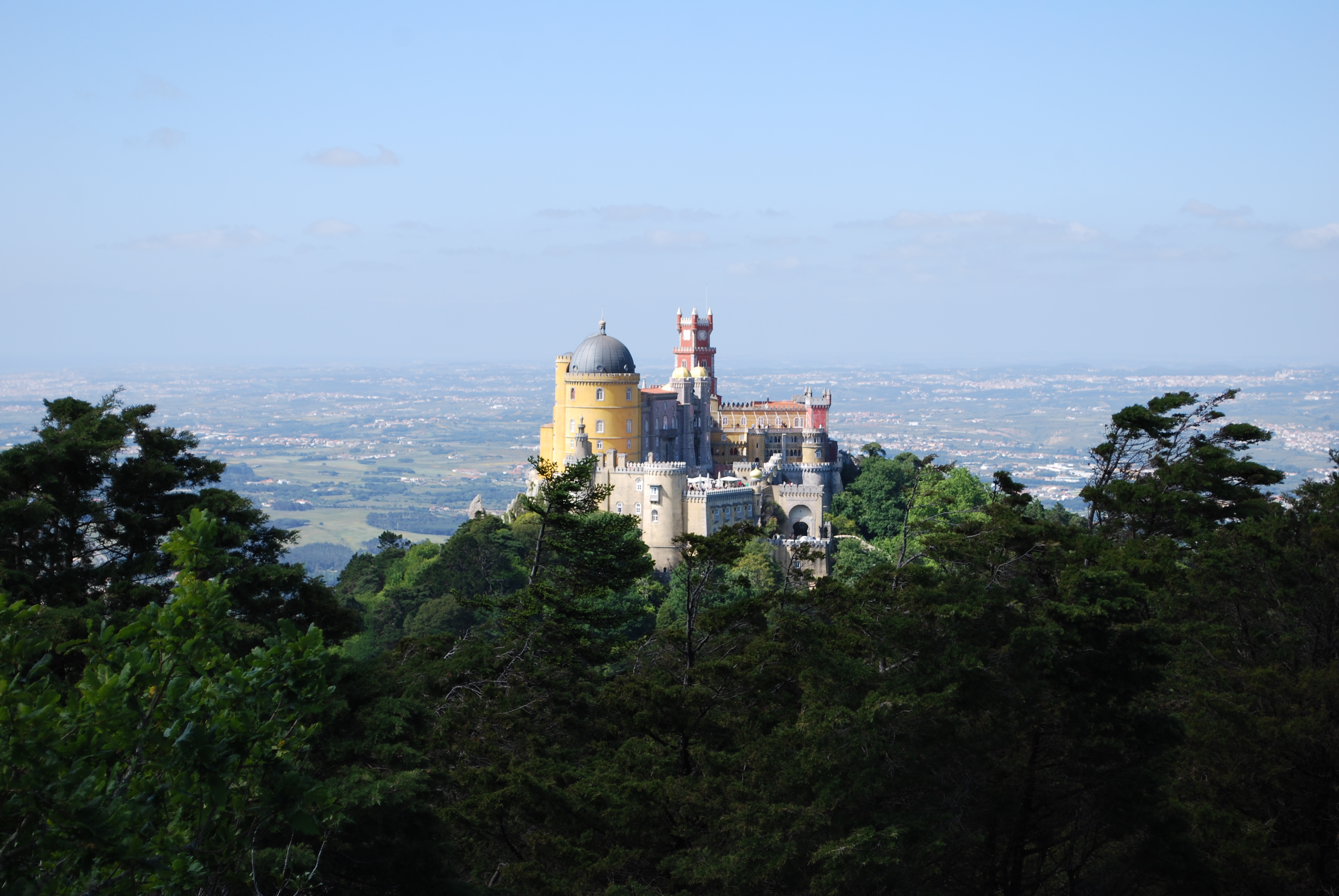 Palácio Nacional da Pena